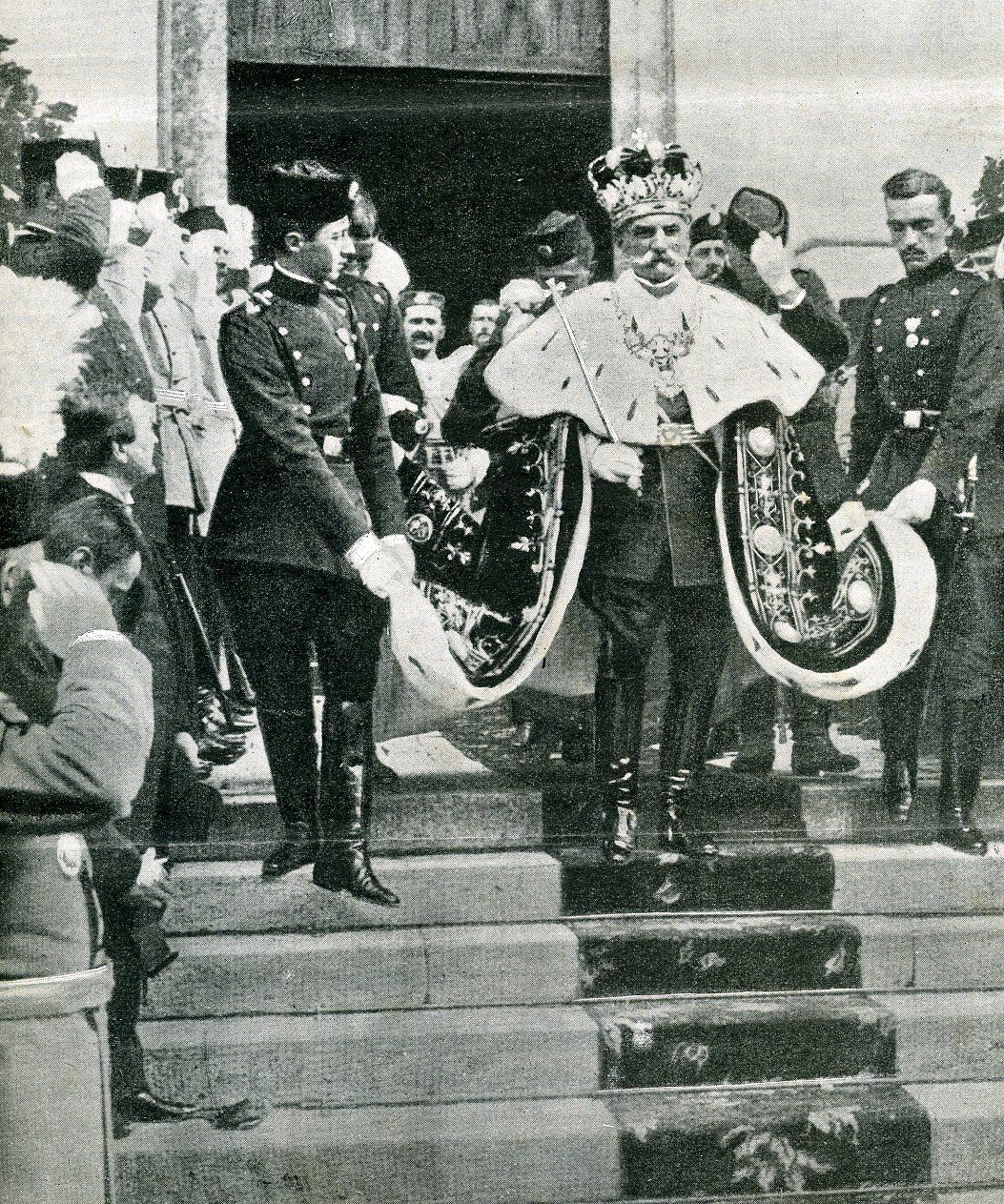 Le couronnement du roi Pierre I de Serbie à Belgradele 11 septembre 1904